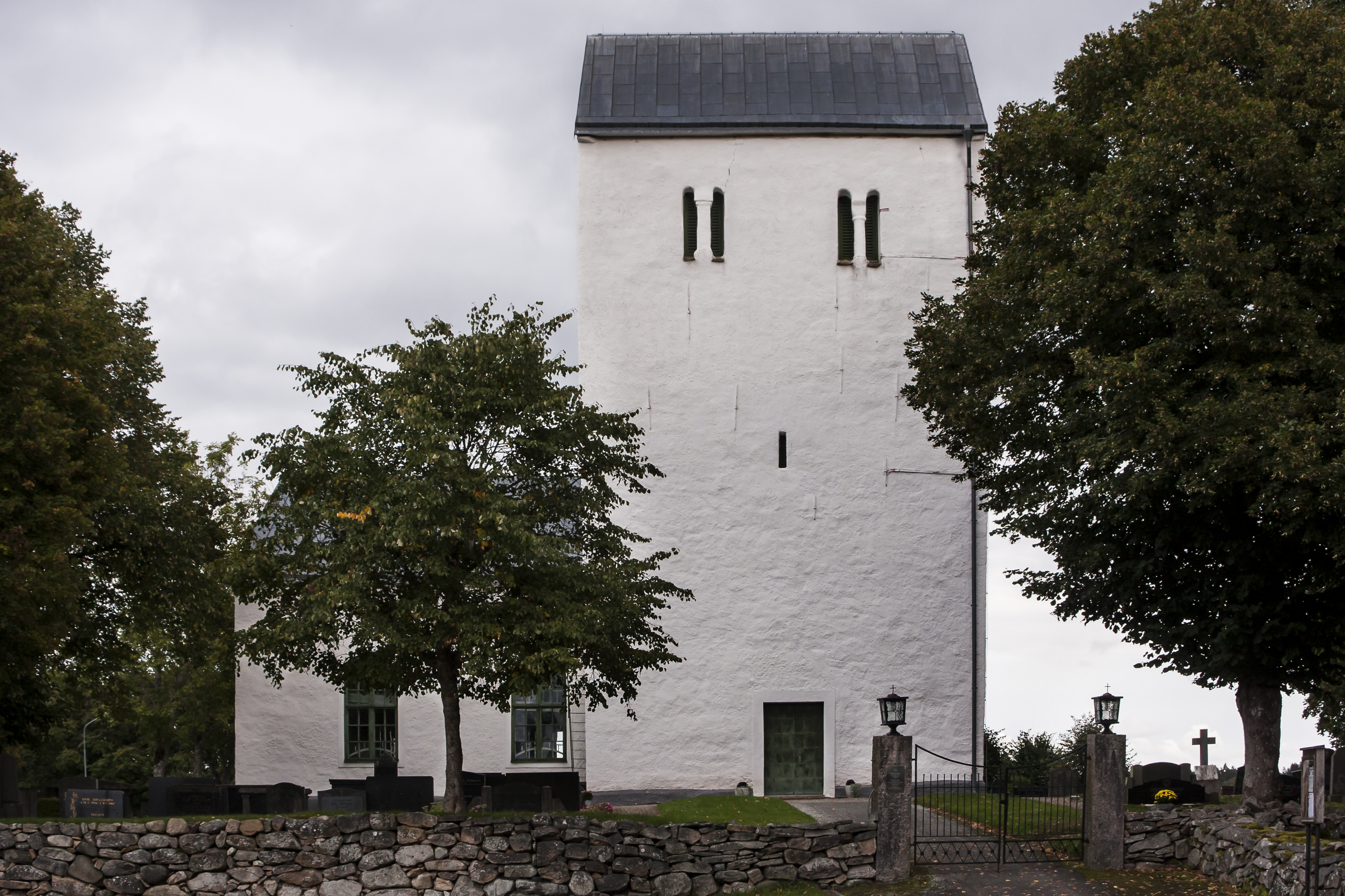 Farstorps kyrka i Farstorp i Hässleholms kommun.